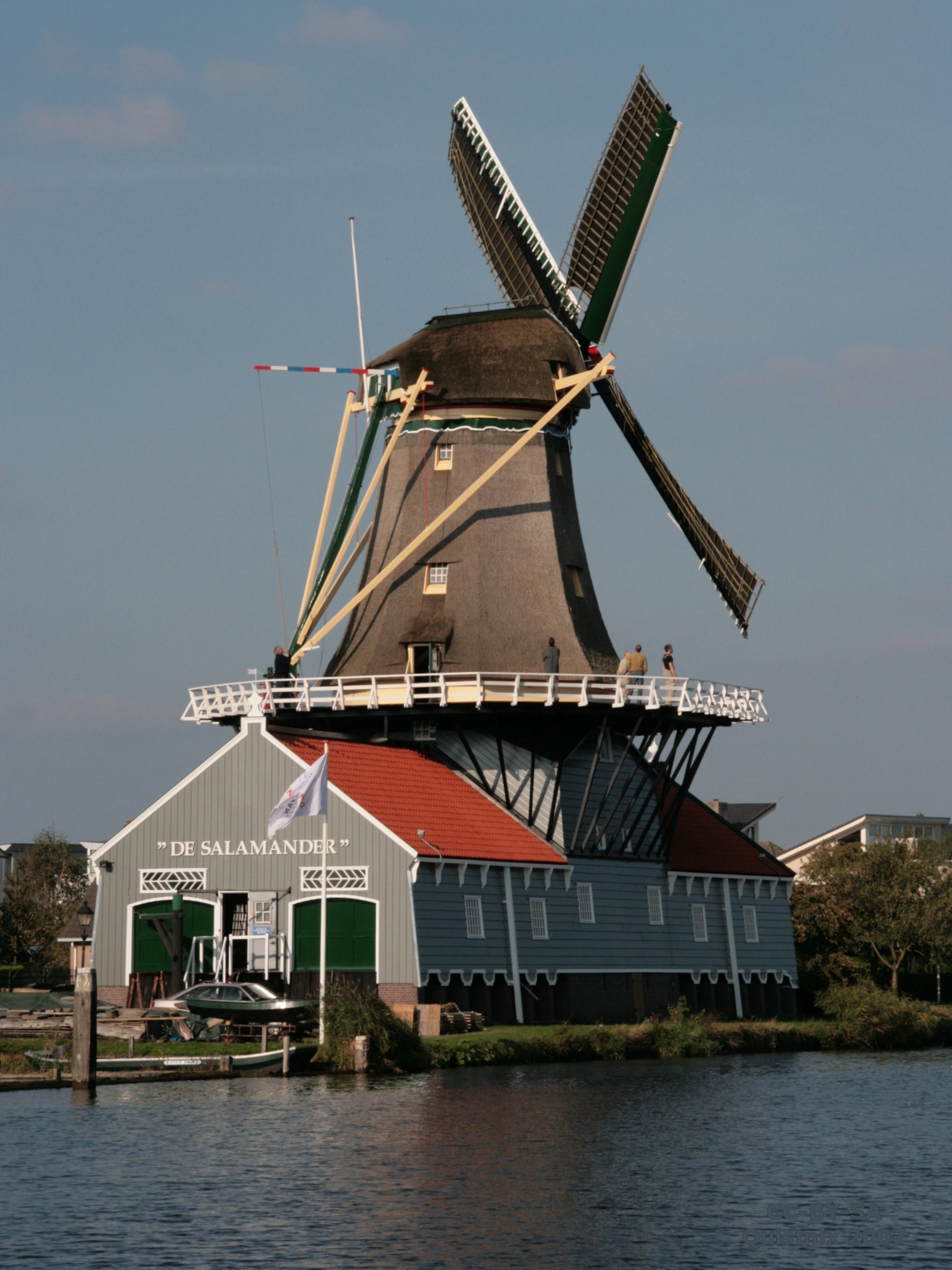 Leidschendam, zaagmolen "De Salamander"